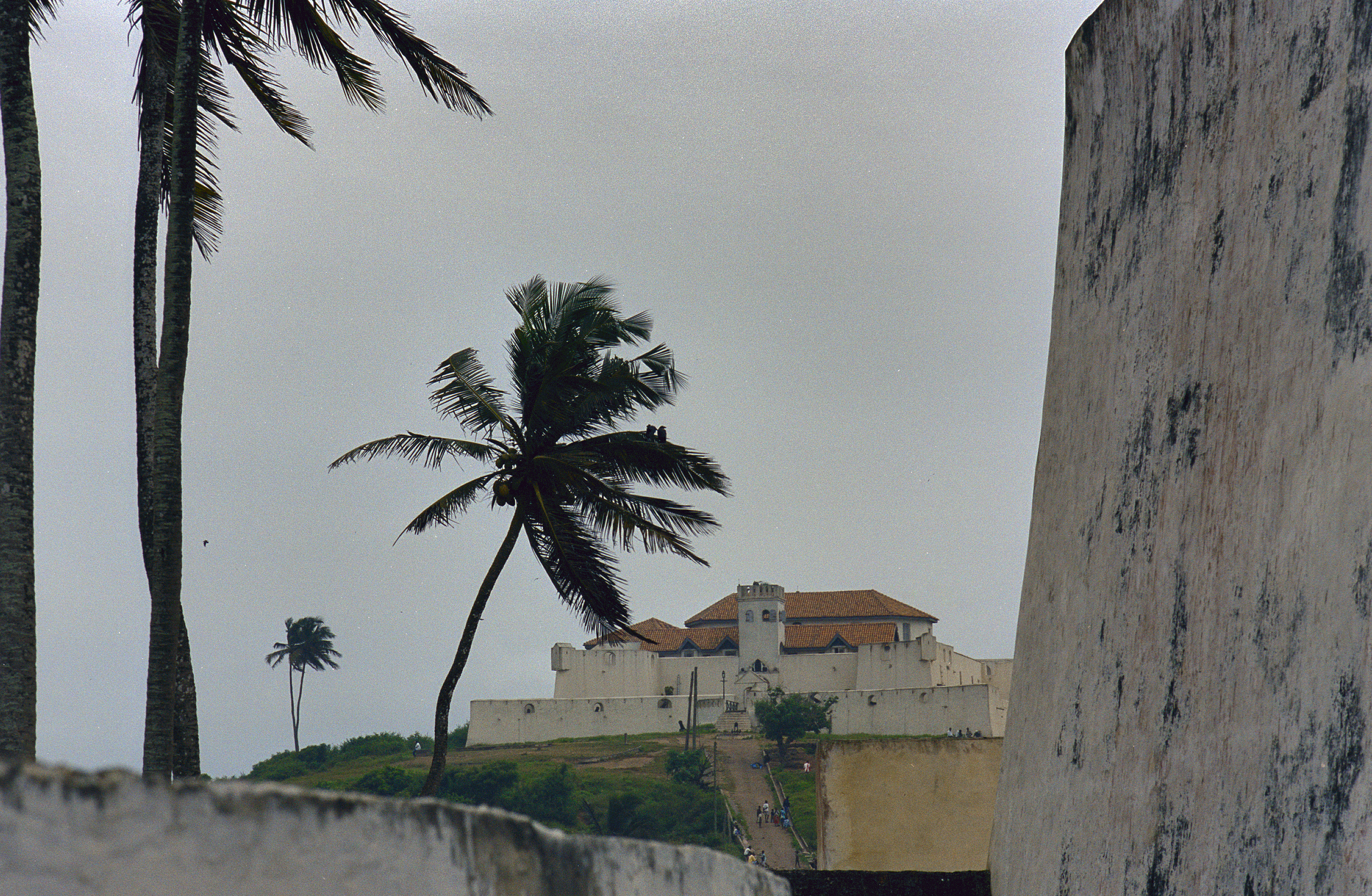 Fort Saint Jago: Overzicht met voorzijde, vanaf Elmina Castle (opmerking: Ghana reis Loek Tangel)